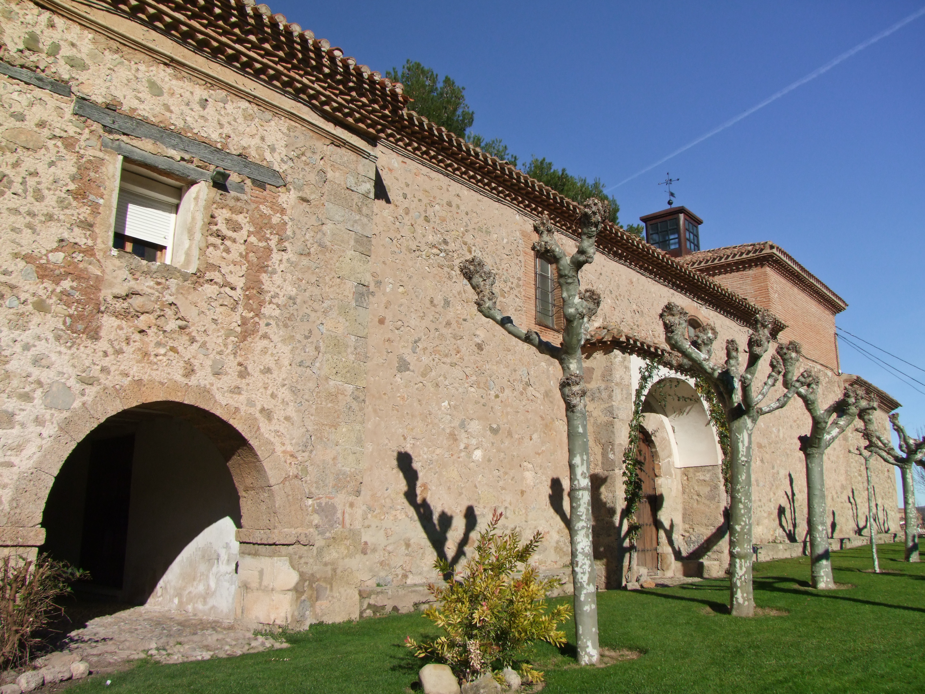 Ermita de Villavieja en la localidad de Nalda, La Rioja - España